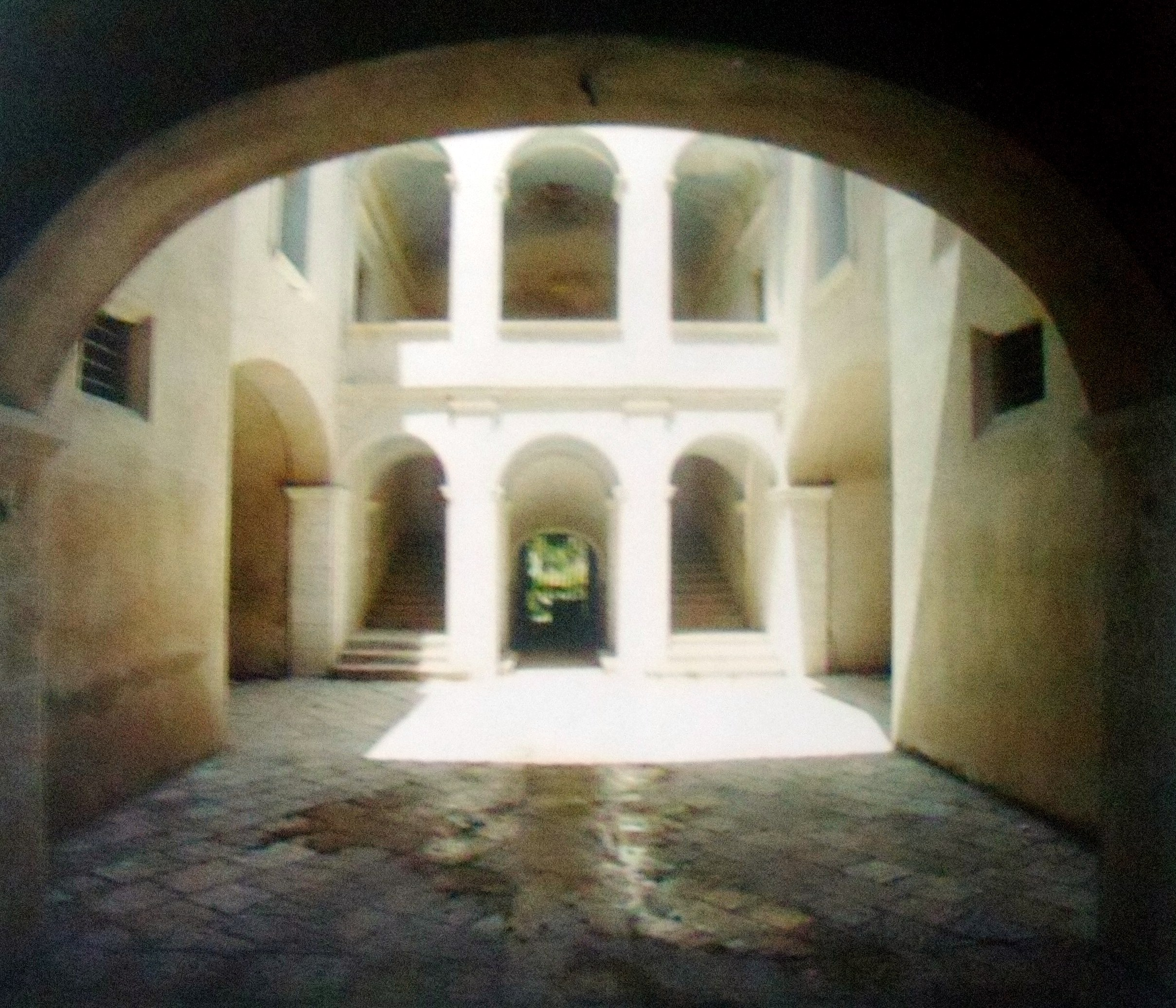 Scorcio dell'interno di Palazzo Magnati in Cerreto Sannita (Italia).